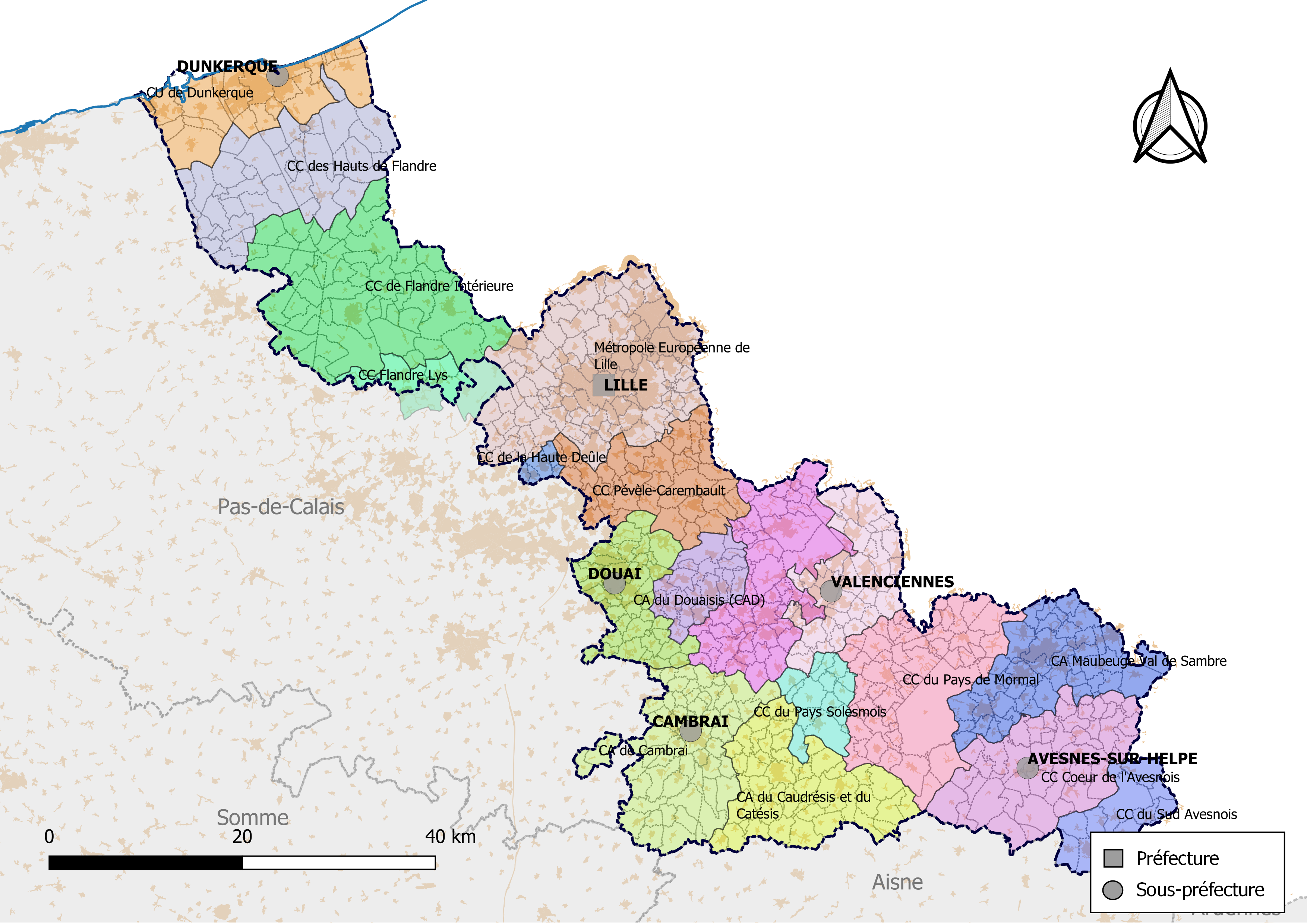 Carte des intercommunalités du département du Nord, France. Composition au 1er janvier 2019.